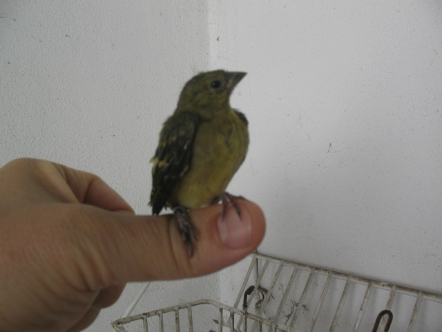 Polluelo que acaba de salir del nido Description: Hooded siskin chick out of nest (Carduelis magellanica) Creator: Eduardo de Matteo. Date: 13 de diciembre de 2007 (13-12-2007) Place: Buenos Aires (Argentina)